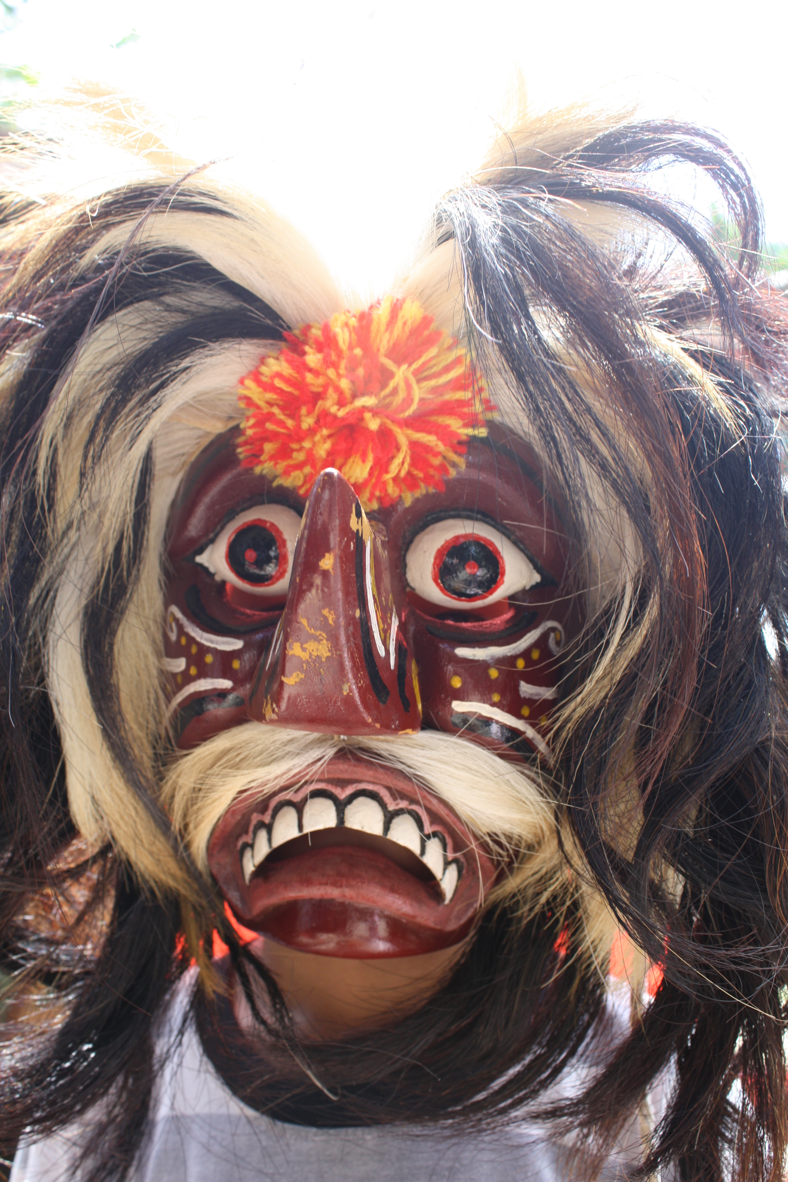 Kalana Barongan Jawa Tengah